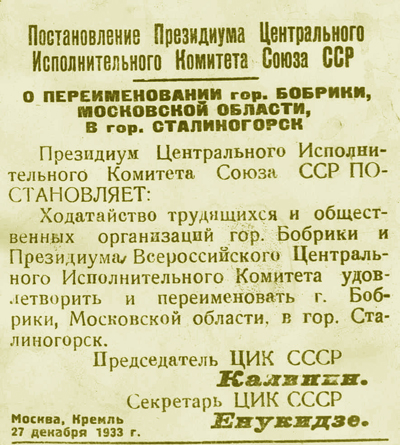 Постановление Президиума Центрального Исполнительного Комитета Союза ССР о переименовании гор. Бобрики Московской области в гор. Сталиногорск